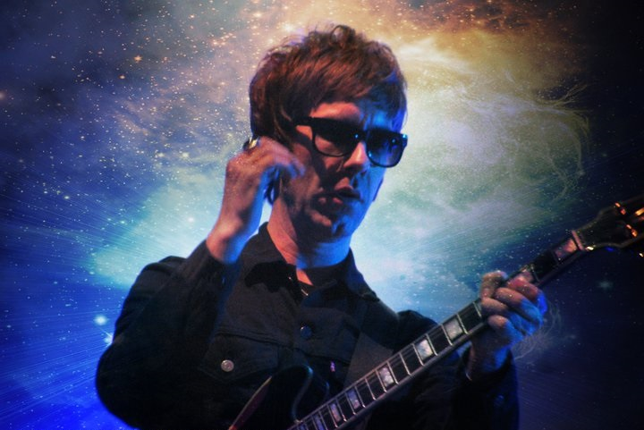 Jay Mehler guitariste, photographie Main Square 2011